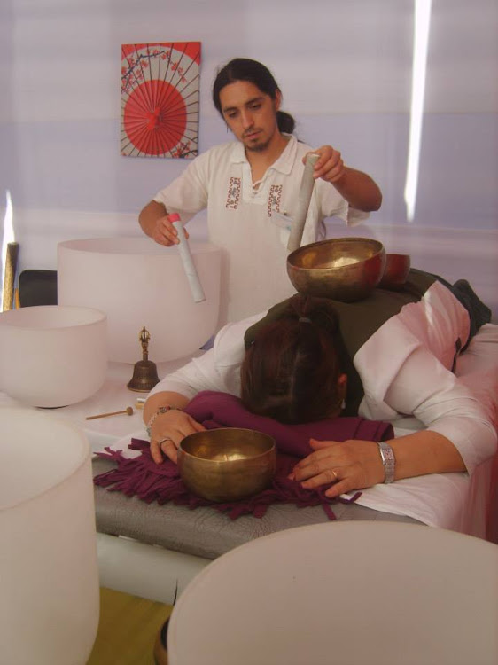 Sesion Sonoterapeutica con Cuencos Tibetanos